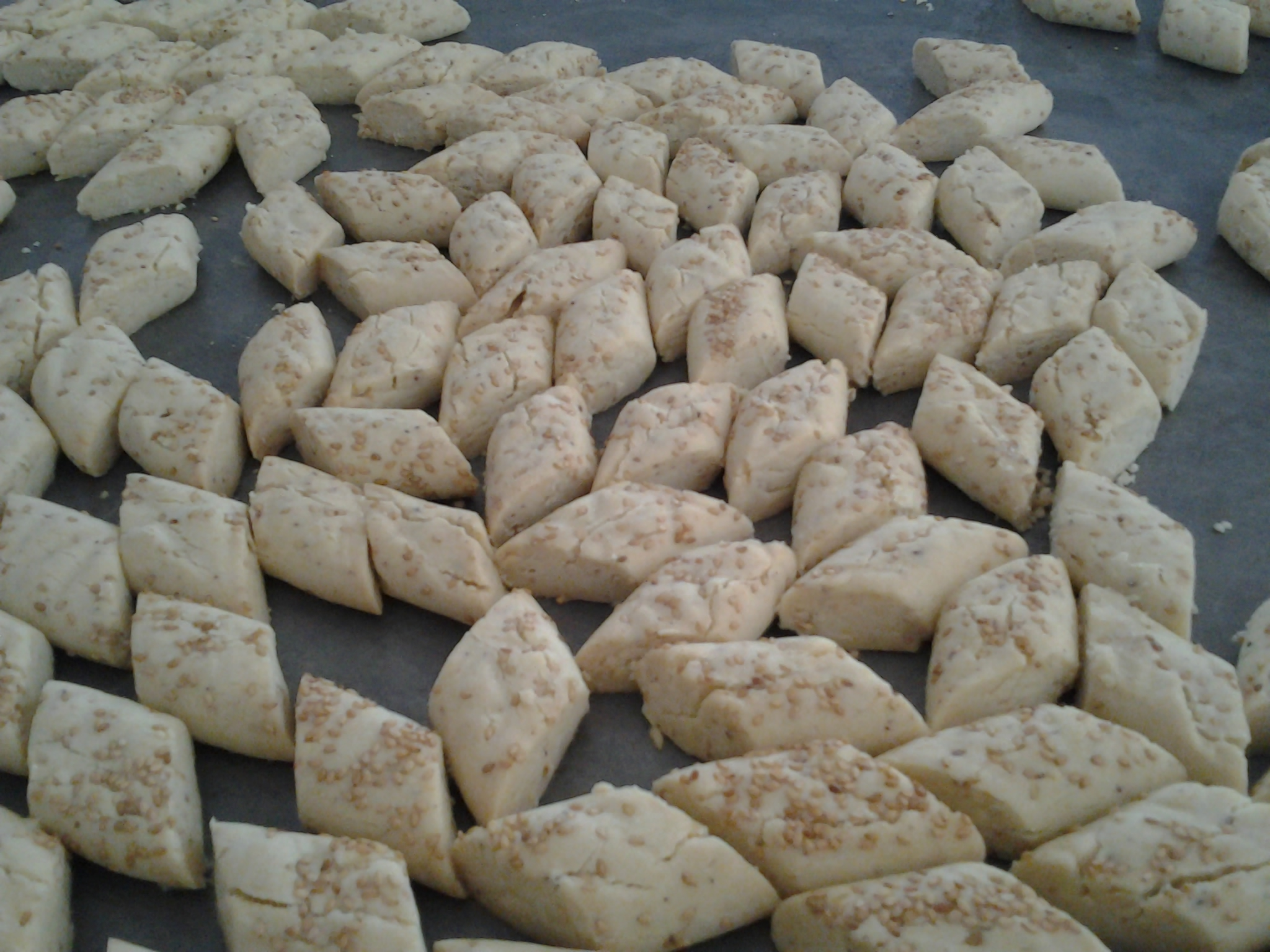 المقروض الابيض نوع من انواع الحلويات في مدينة صفاقس .....